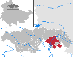 An der Schmücke im Kyffhäuserkreis, Thüringen